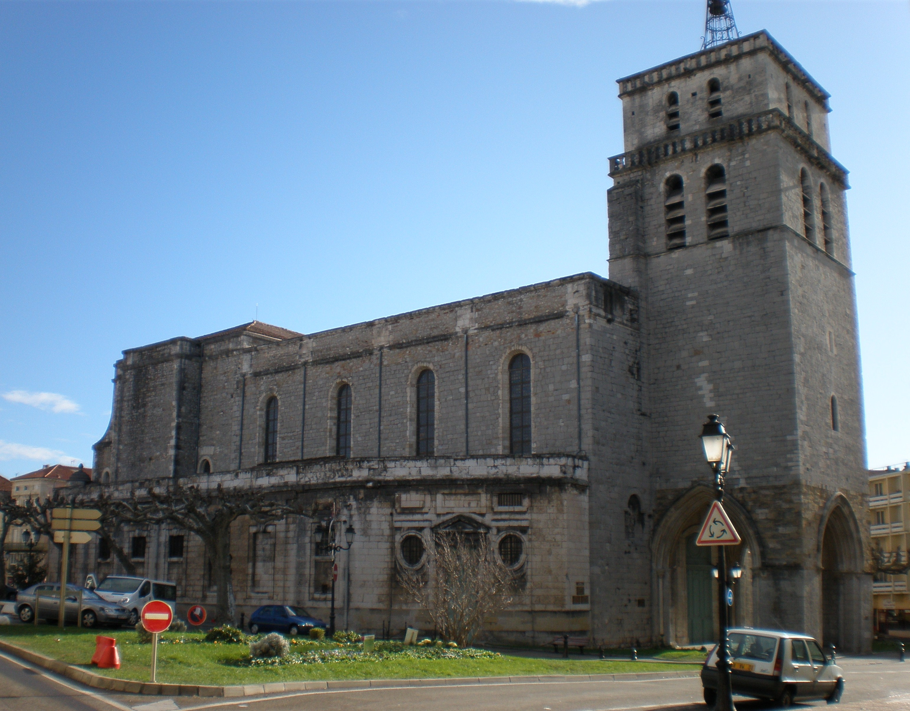 La cathédrale Saint-Jean-Baptiste d'Alès (Gard)